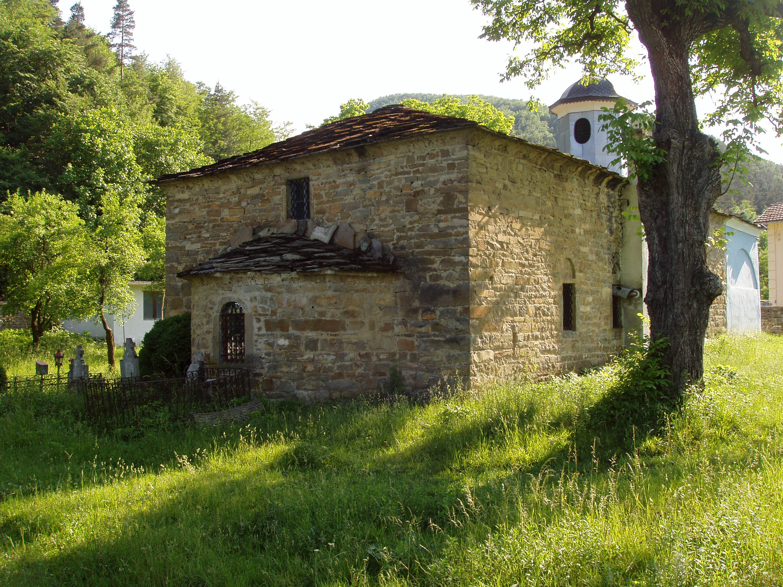 Църквата в село Бериево, Габровска област.